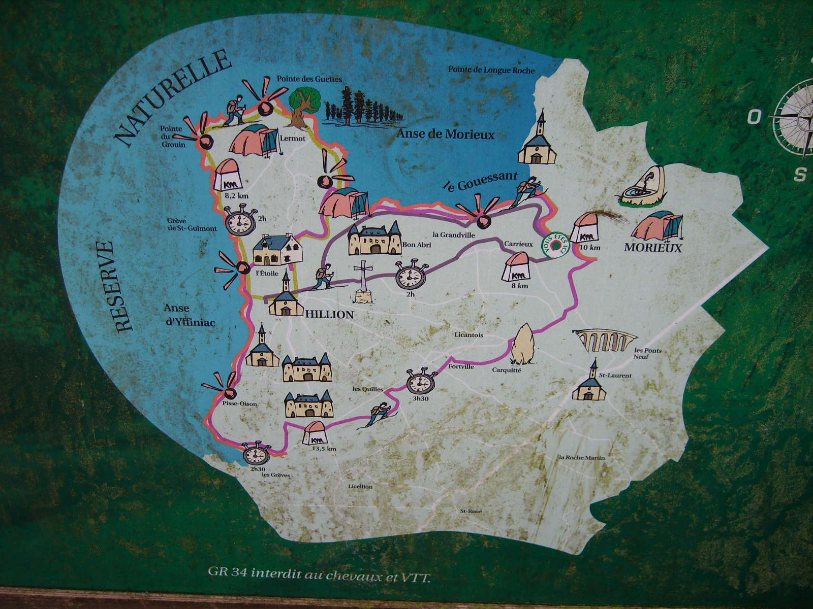 piedĉirkaŭiro de Pont Rolland en Hillion (Bretonio)